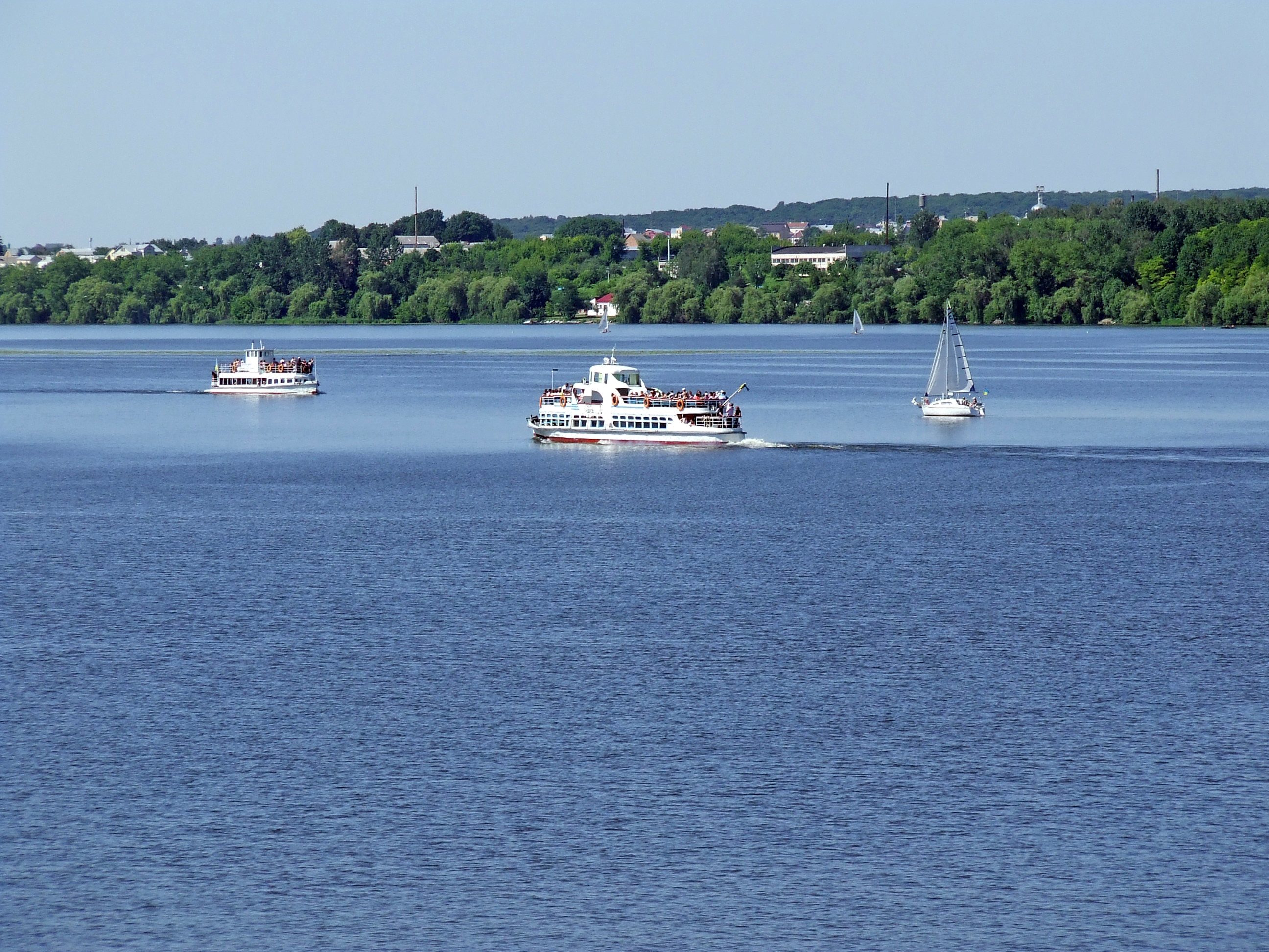 Тернопільський флот: «Герой Танцоров», «Капітан Т. Г. Парій» і яхта «Світлана» на Тернопільському ставі.